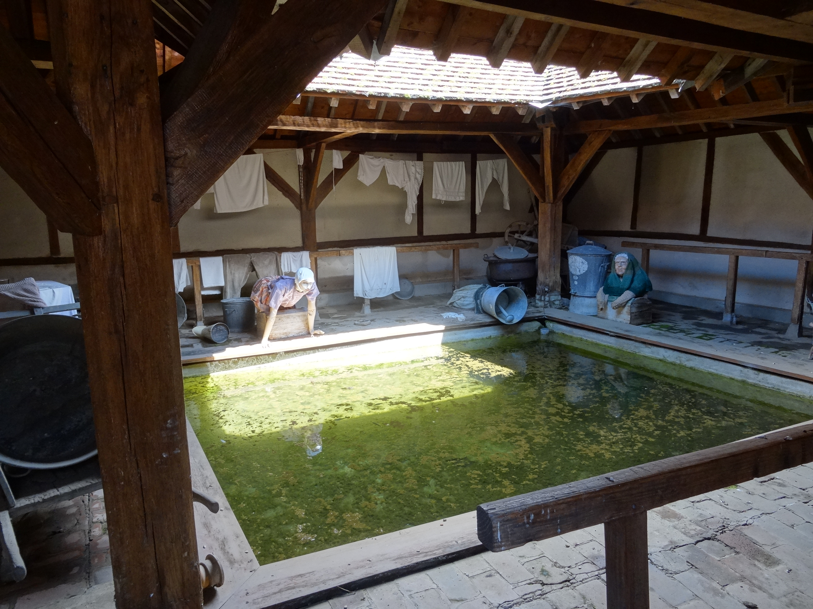 Lavoir de Beton-Bazoches. (Seine-et-Marne, région Île-de-France).